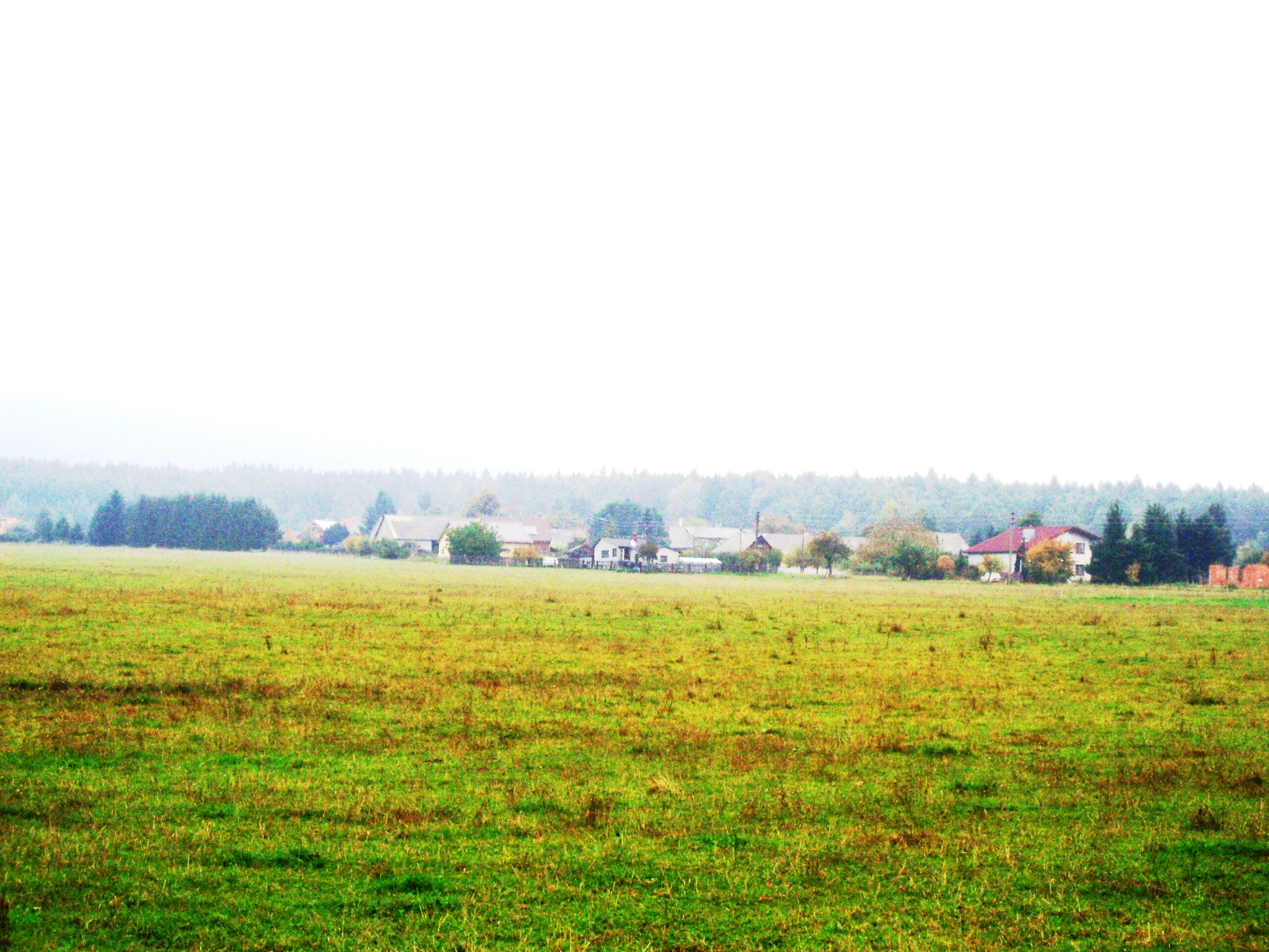 Zalány - obec u Rožmitálu p.Třemšínem